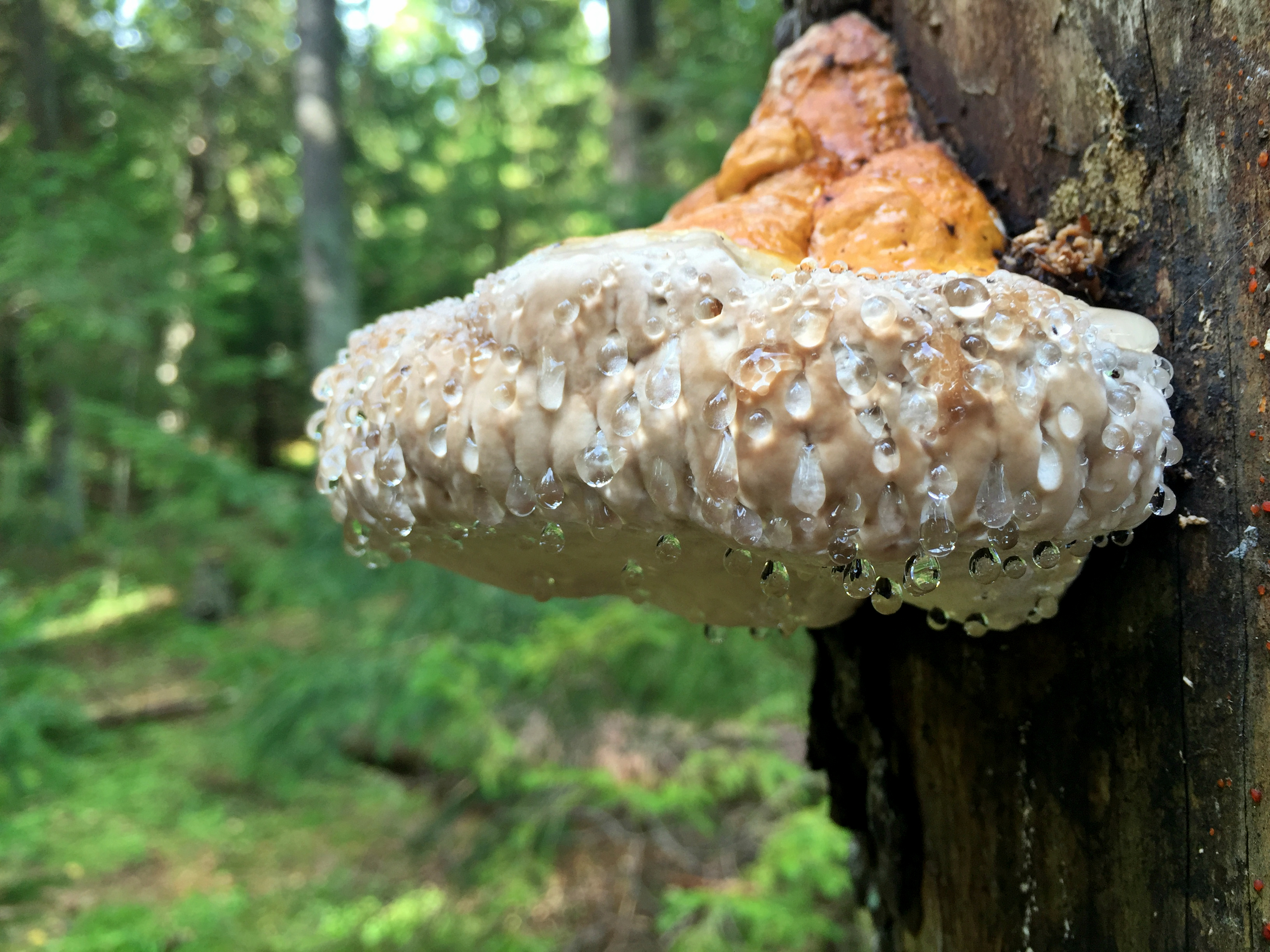 Gutatsioon kännupessil